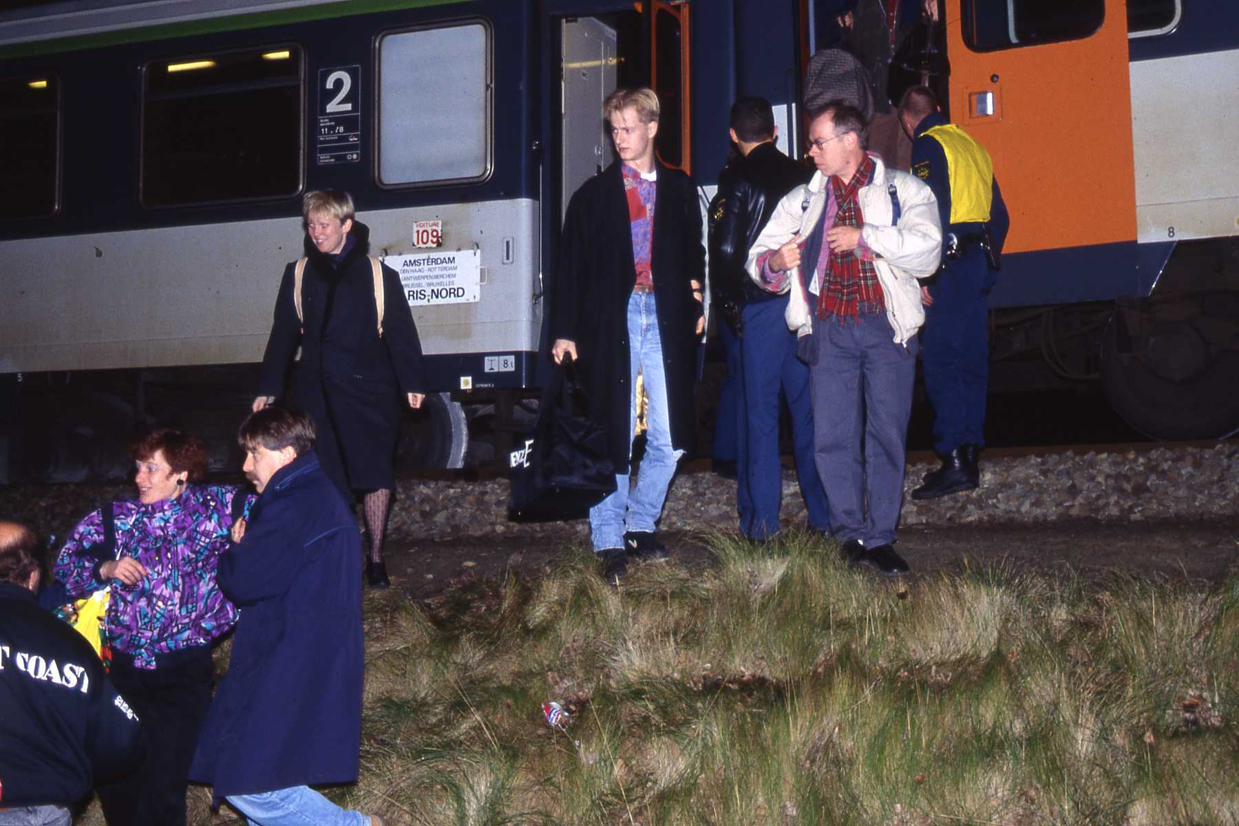 Ontspoorde Amsterdam Parijs trein in Hoofddorp. Evacutatie van de reizigers. Twee dagen later vond het Treinongeval bij Hoofddorp op ongeveer dezelfde plek plaats, waarbij 5 doden vielen.